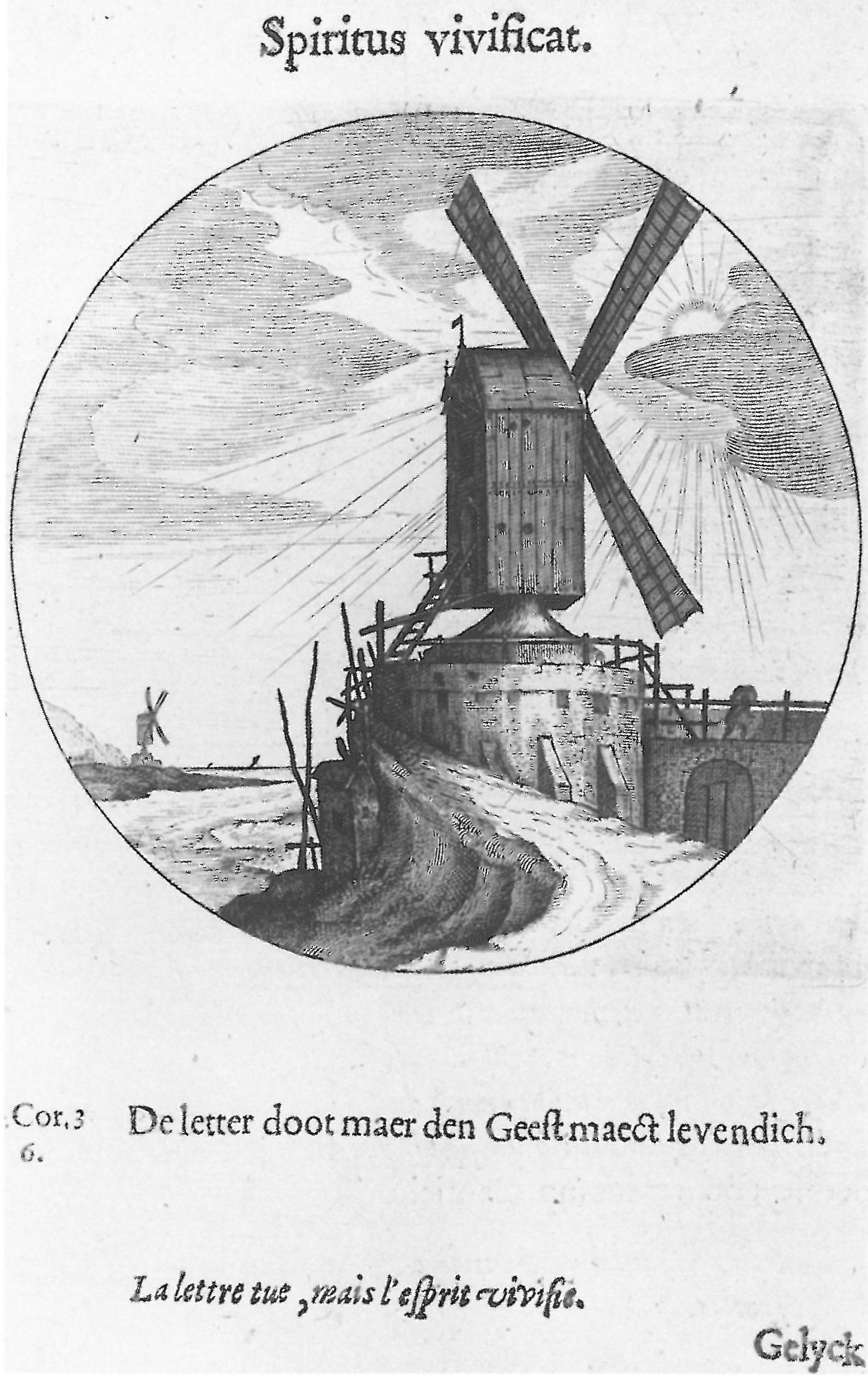 Druck von Zacharias Heyns mit dem Sinnspruch Spiritus vivificat